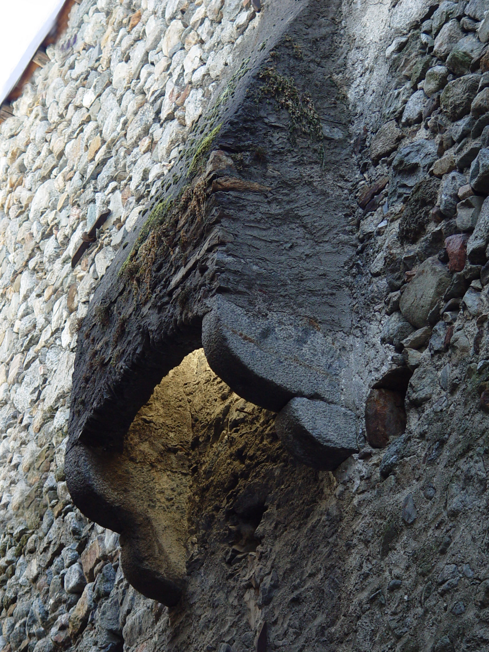 Description Caditoia del Castello che fu di Stefano Quadrio Date n/a Location Via Torre, Chiuro, Sondrio - Italy Photographer Franco Folini